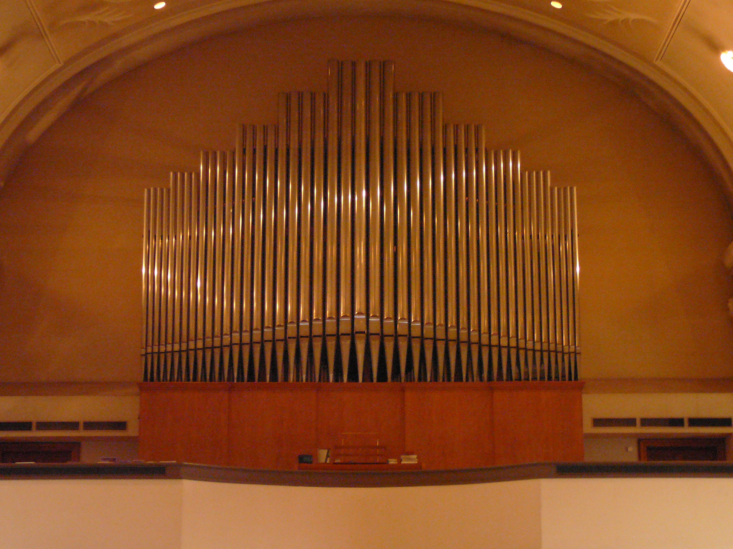 Römisch-katholische Pfarrkirche Guthirt, Zürich,Orgel